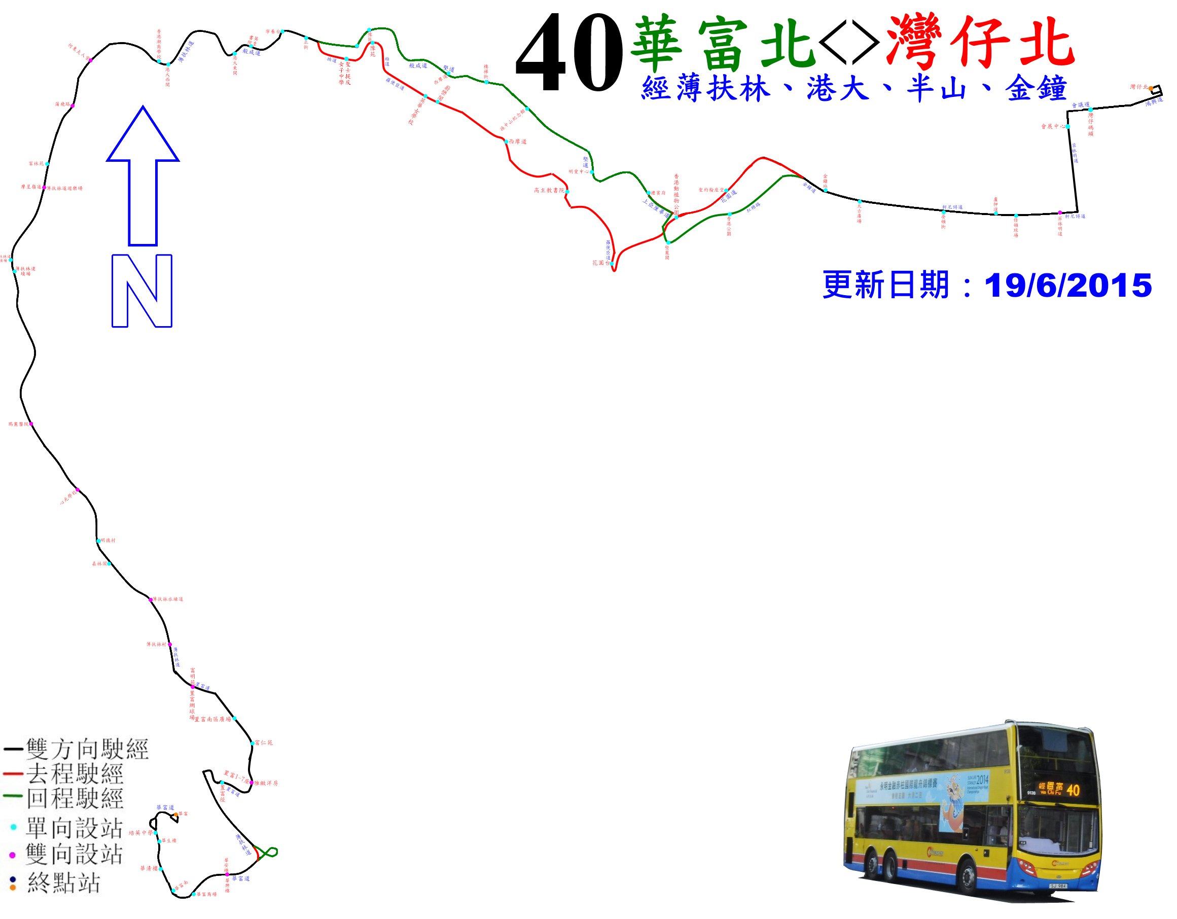 中文（香港）: 城巴40線走線圖